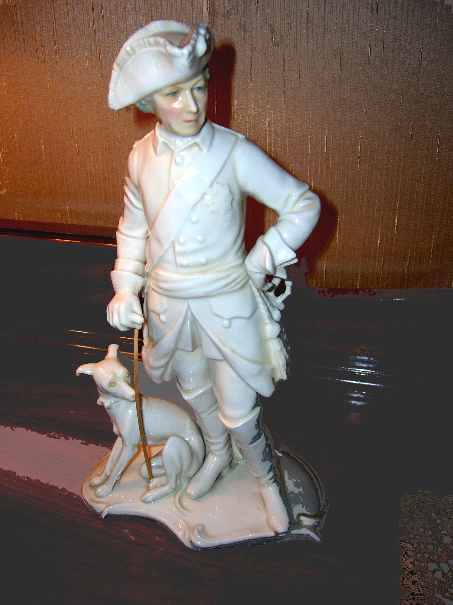 Parzeläinsfigur vum grousse Fritz